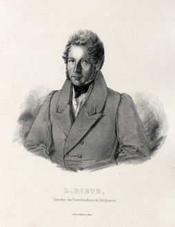 Porträt des Wilhelm Ludwig Dietz (* 1785 in Karlsruhe; † 8. April 1837 ebenda) war ein badischer Ministerialbeamter und Direktor der Vereinigten Forsten und Bergwerke.